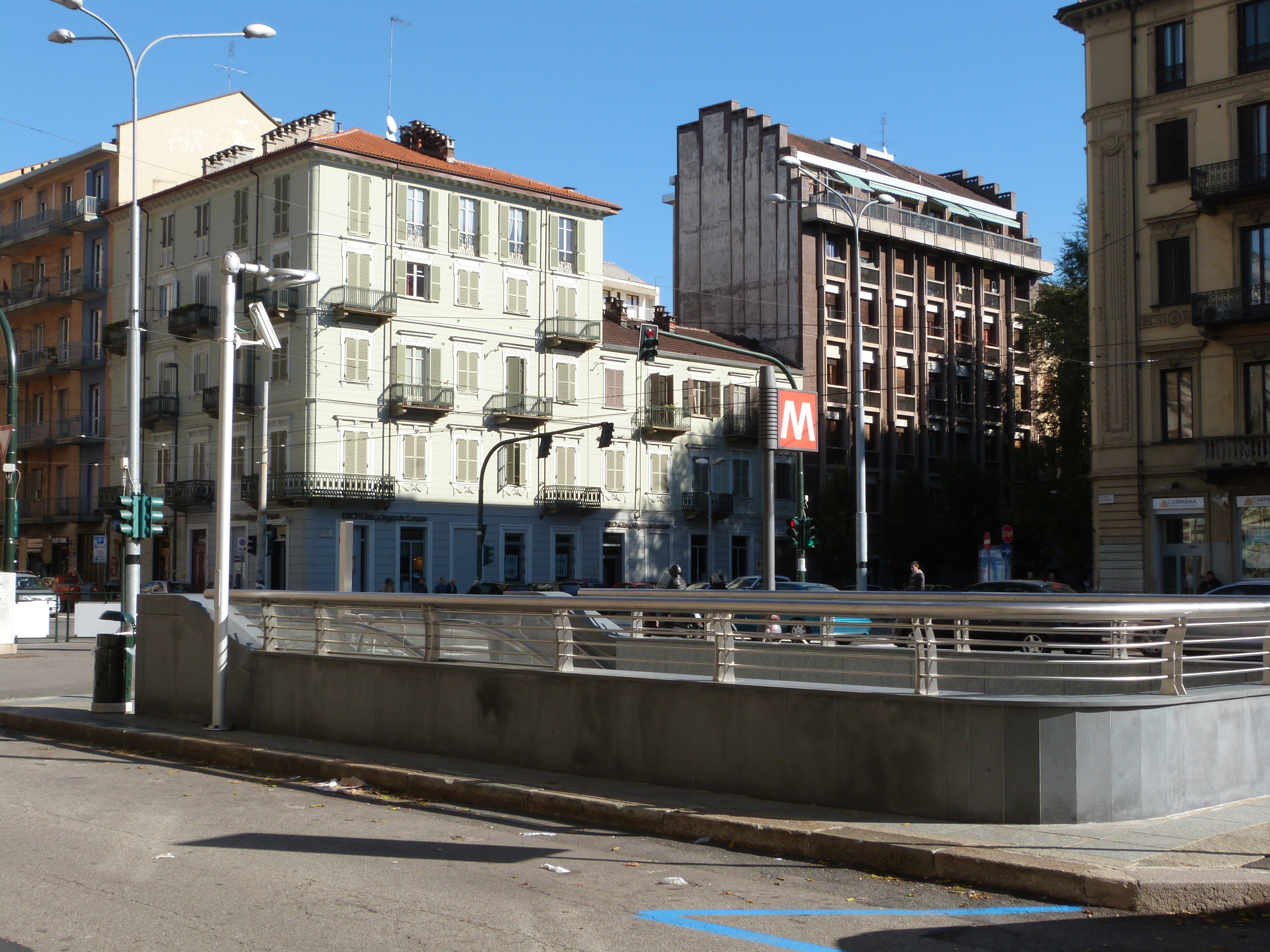 Stazione della metropolitana di Torino, fermata Dante.Piemontèis: Metropolitan-a ëd Turin, stassion "Dante".